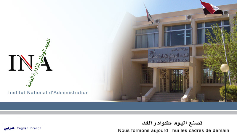 ina offical web site intro